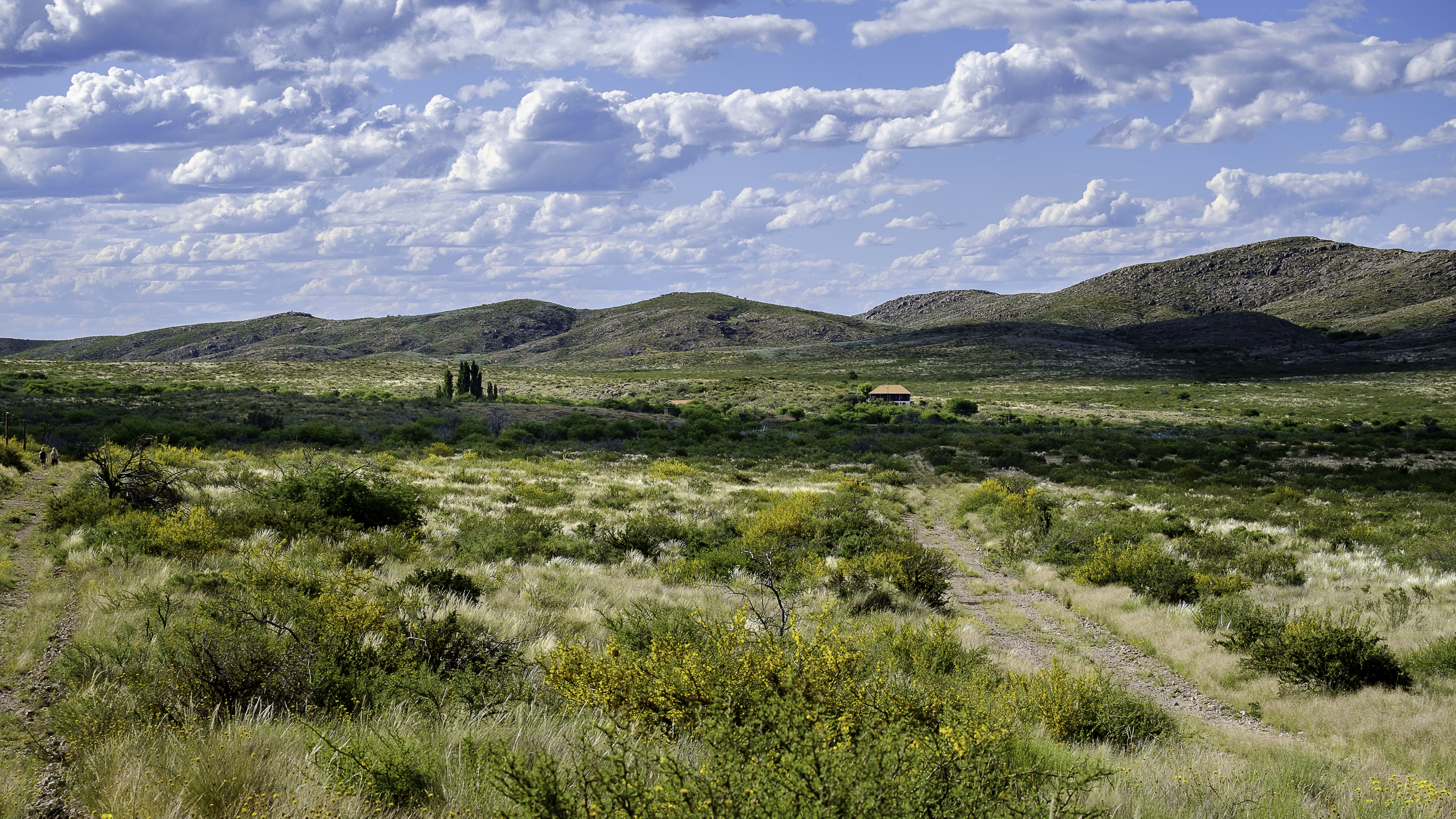 Parque Nacional Lihué Calel